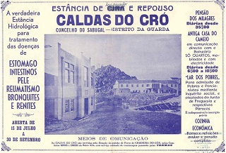 Termas do Cró - Sabugal